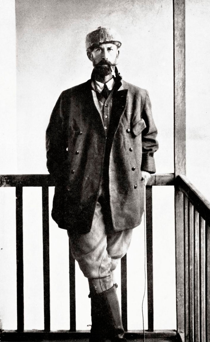 Summary Colonel Percy Harrison Fawcett. Colonel Percy Harrison Fawcett in 1911. Figura de domínio público, originalmente disponibilizada em Licensing